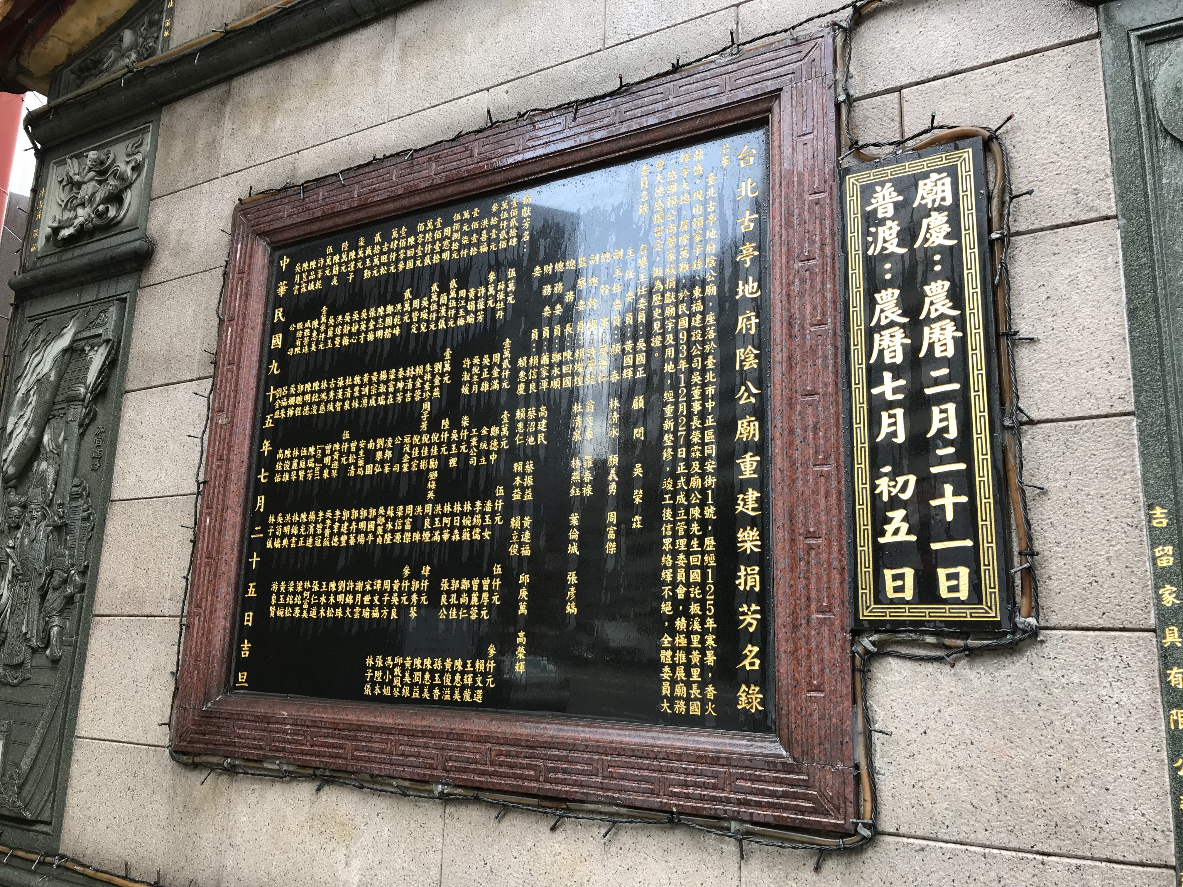 中文（台灣）: 古亭地府陰公廟重建樂捐芳名錄